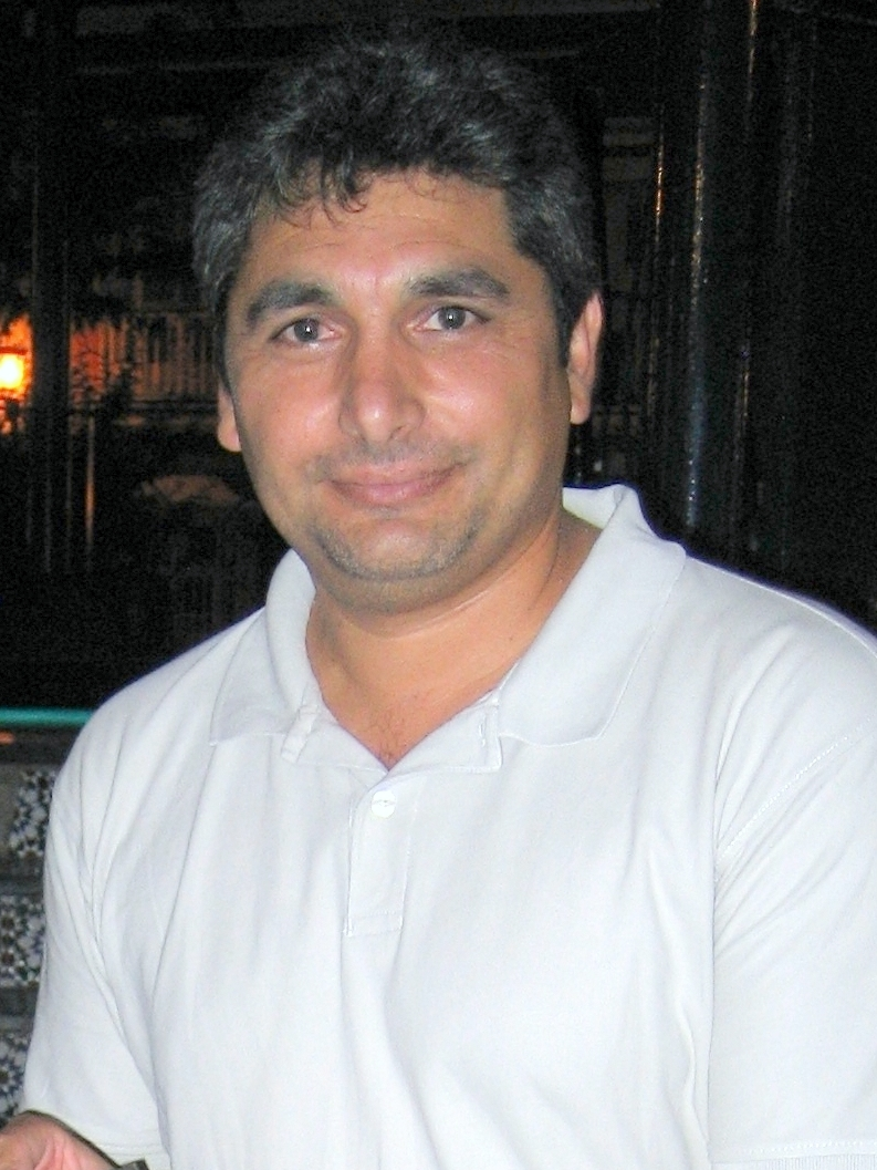 Juan José Cortés.